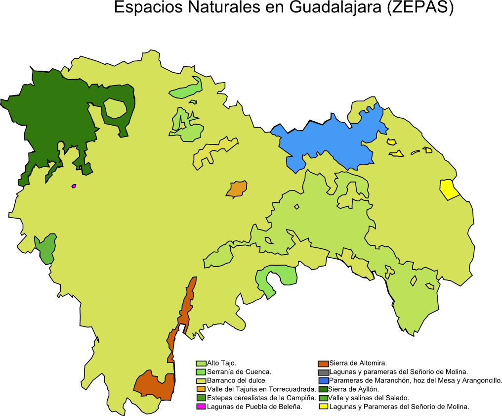 Mapa de las ZEPAS (Red NATURA 2000), de la provincia de Guadalajara, Castilla-La Mancha, España.